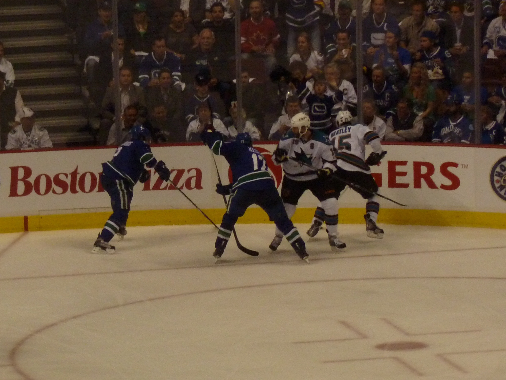 SJ @ Van, 24-May-2011